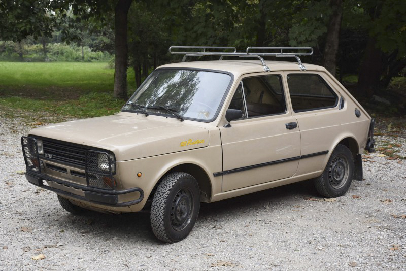 Fiat 127 Rustica assemblata dalla Lamborghini con componenti e scocche importate dalla Fiasa (Fiat Brasile) su base Fiat 147